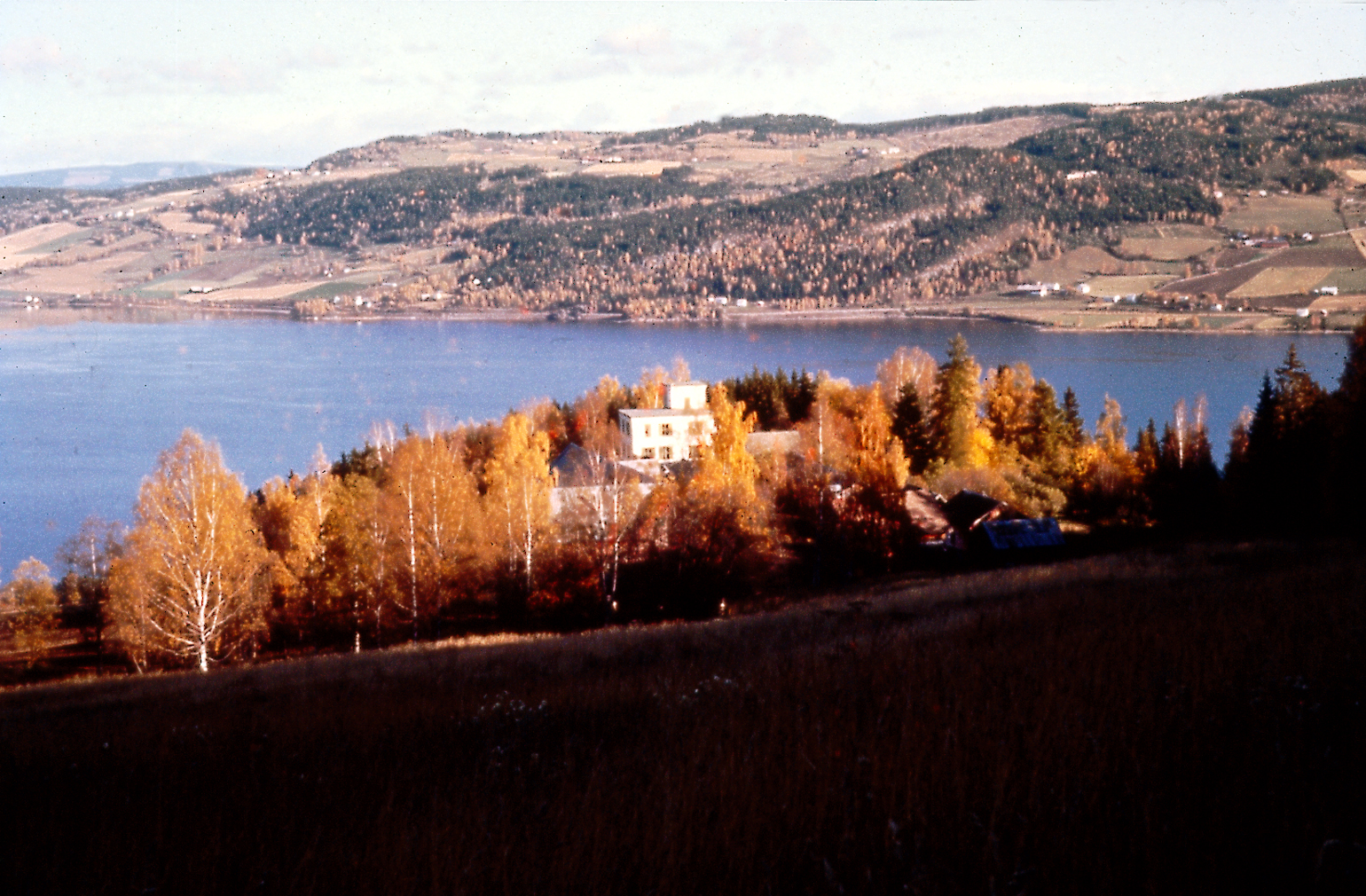 Flyfoto av området Honne fra 1968